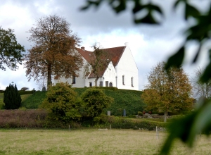 Pedersborg Kirke, set fra sydvest